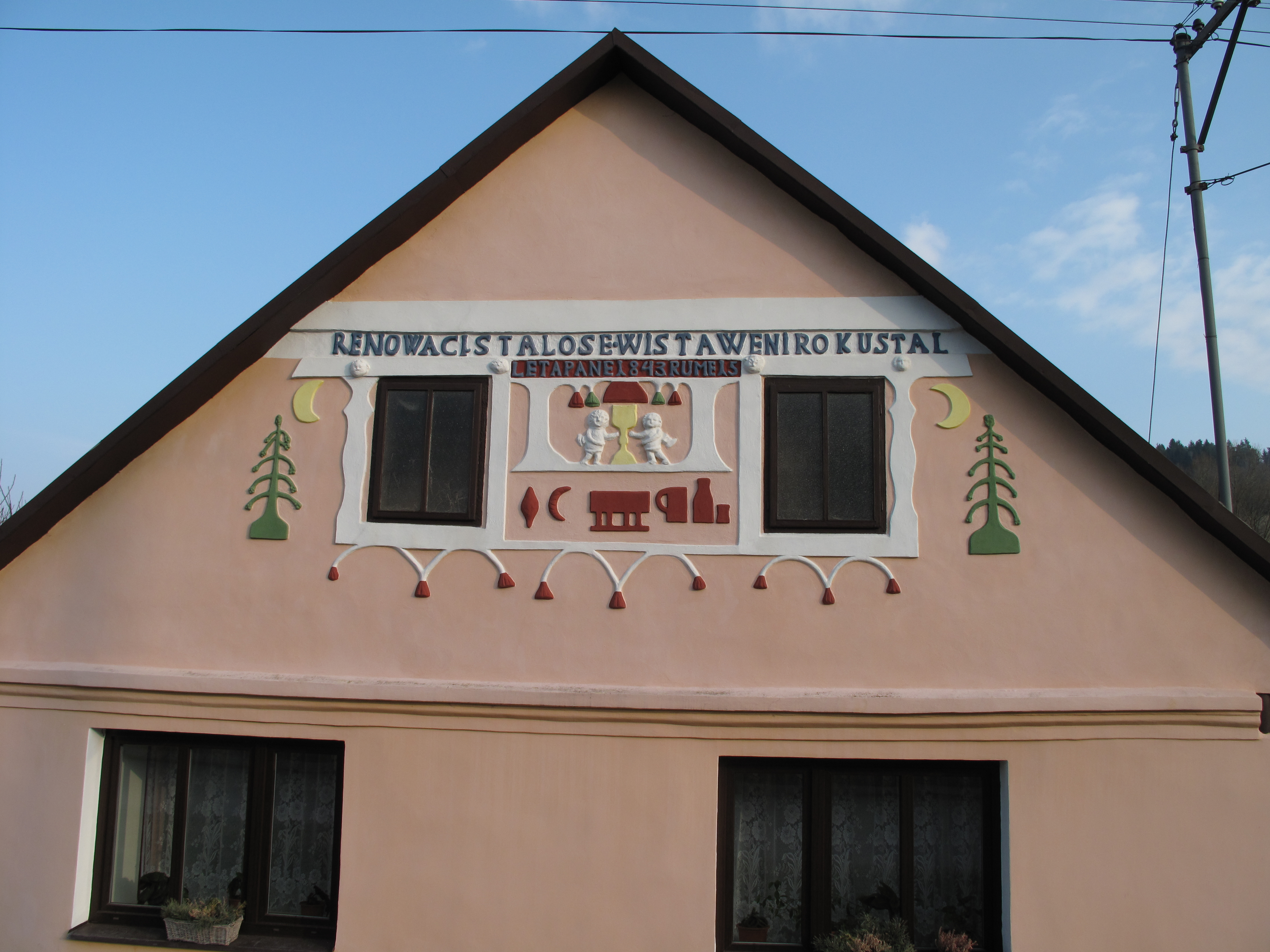 Štít domu v Kovaníně. Okres Prachatice, Česká republika.